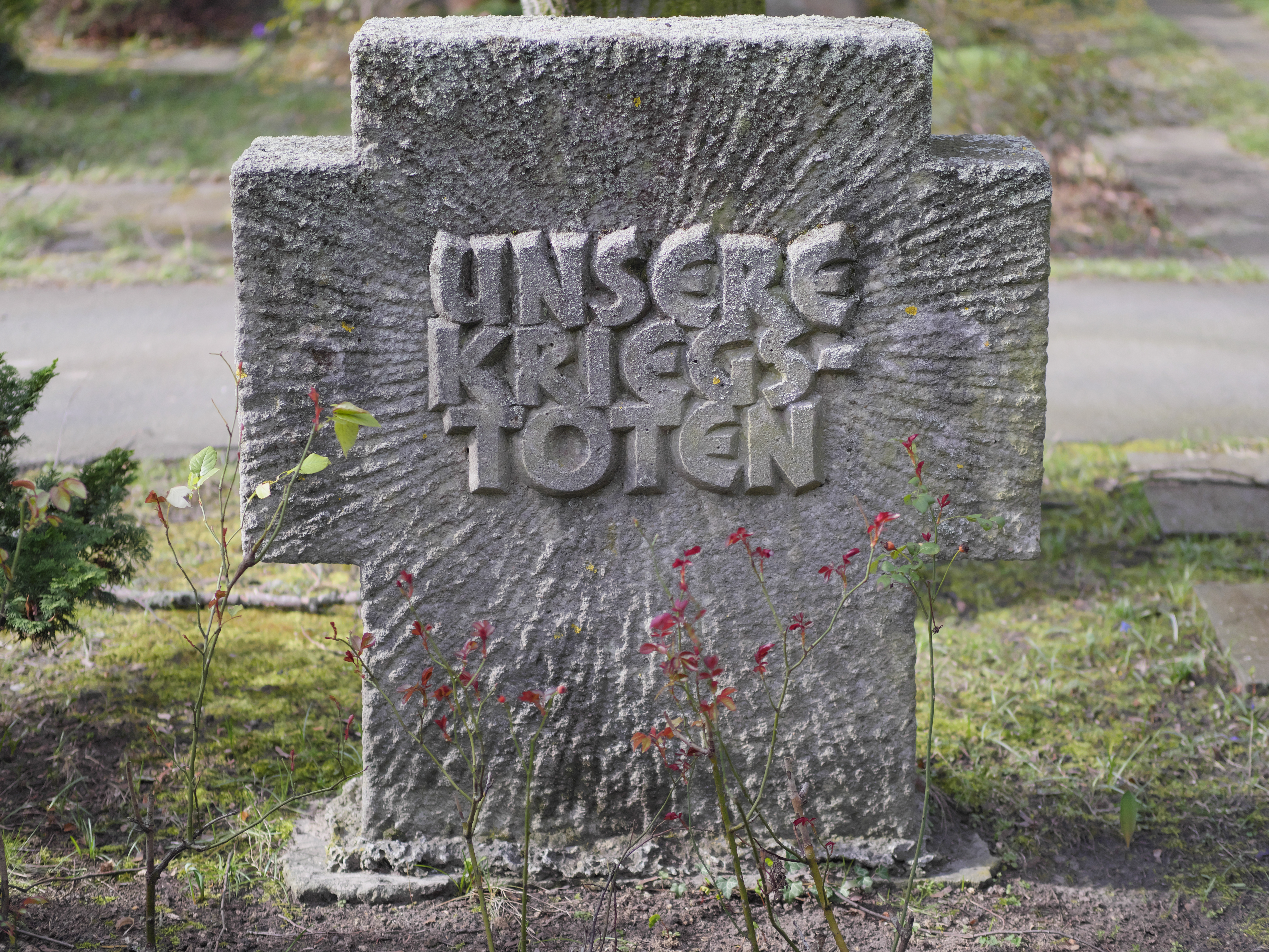 Gedenkkreuz für Kriegstote auf dem Kirchhof Sankt Simeon und Sankt Lukas in Berlin-Britz mit der Aufschrift "Unsere Kriegstoten"